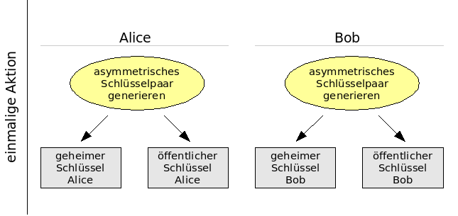 Hybrides Verschlüsselungsverfahren: Schlüsselgenerierung